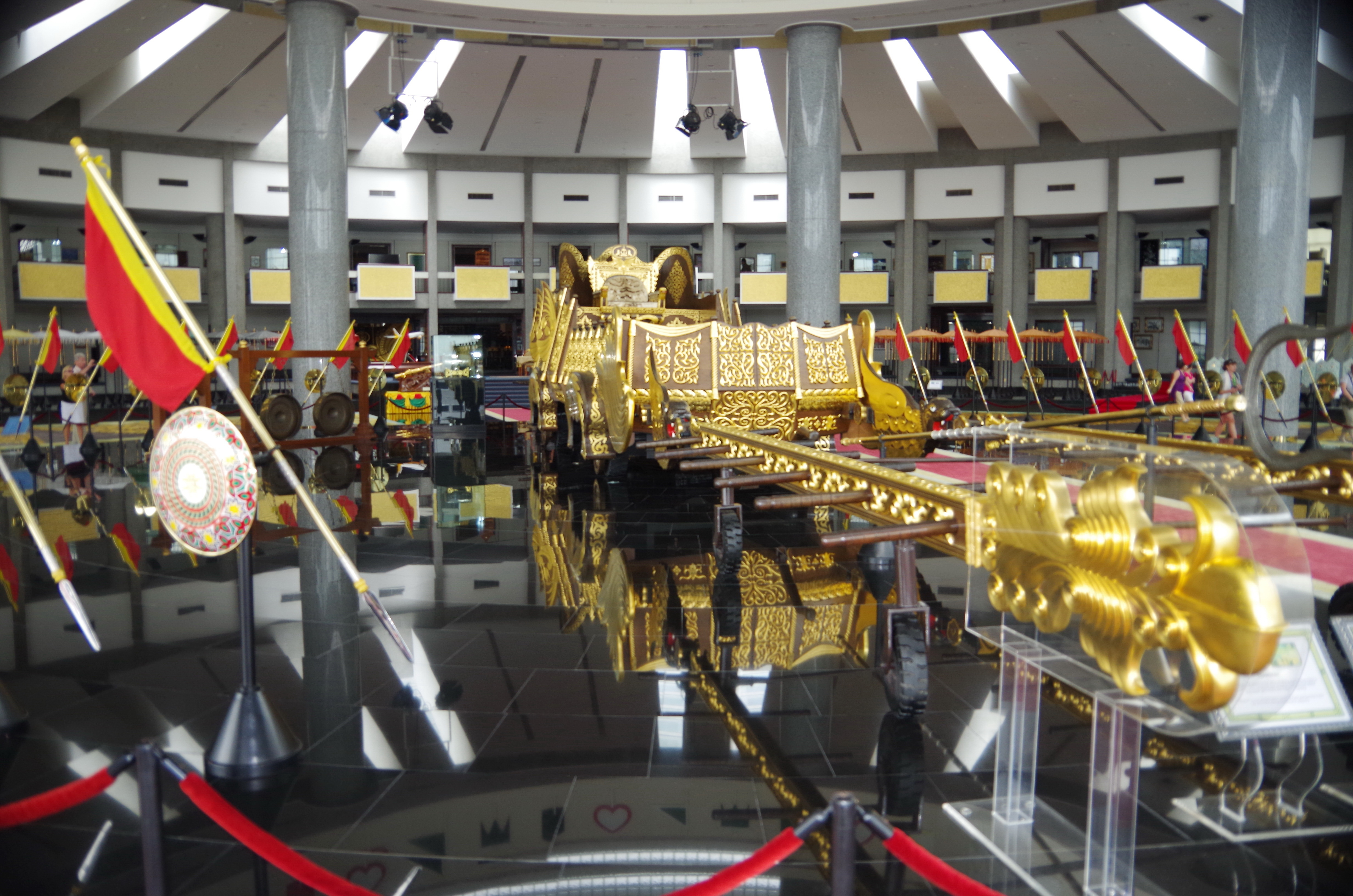 Wagen de Sultans, Royal Regalia Building